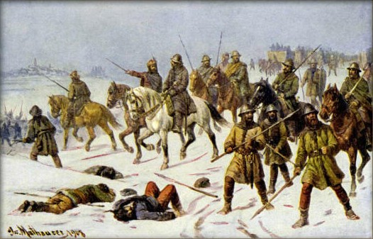 Josef Mathauser - Žižka před Kutnou Horou